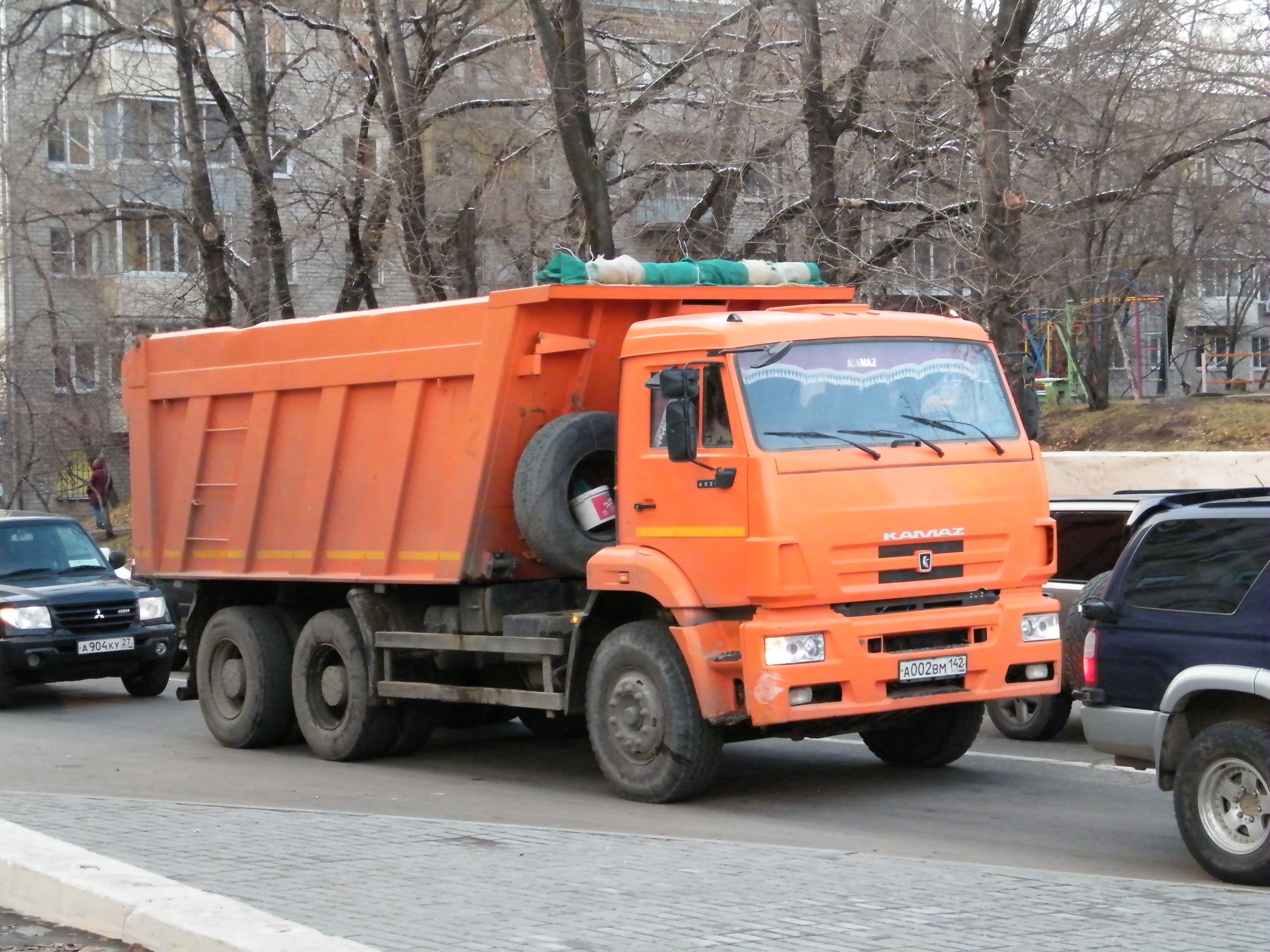 KamAZ-6522